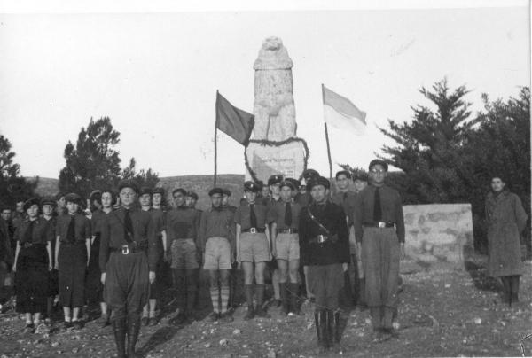 מסדר ביתר בתל חי.